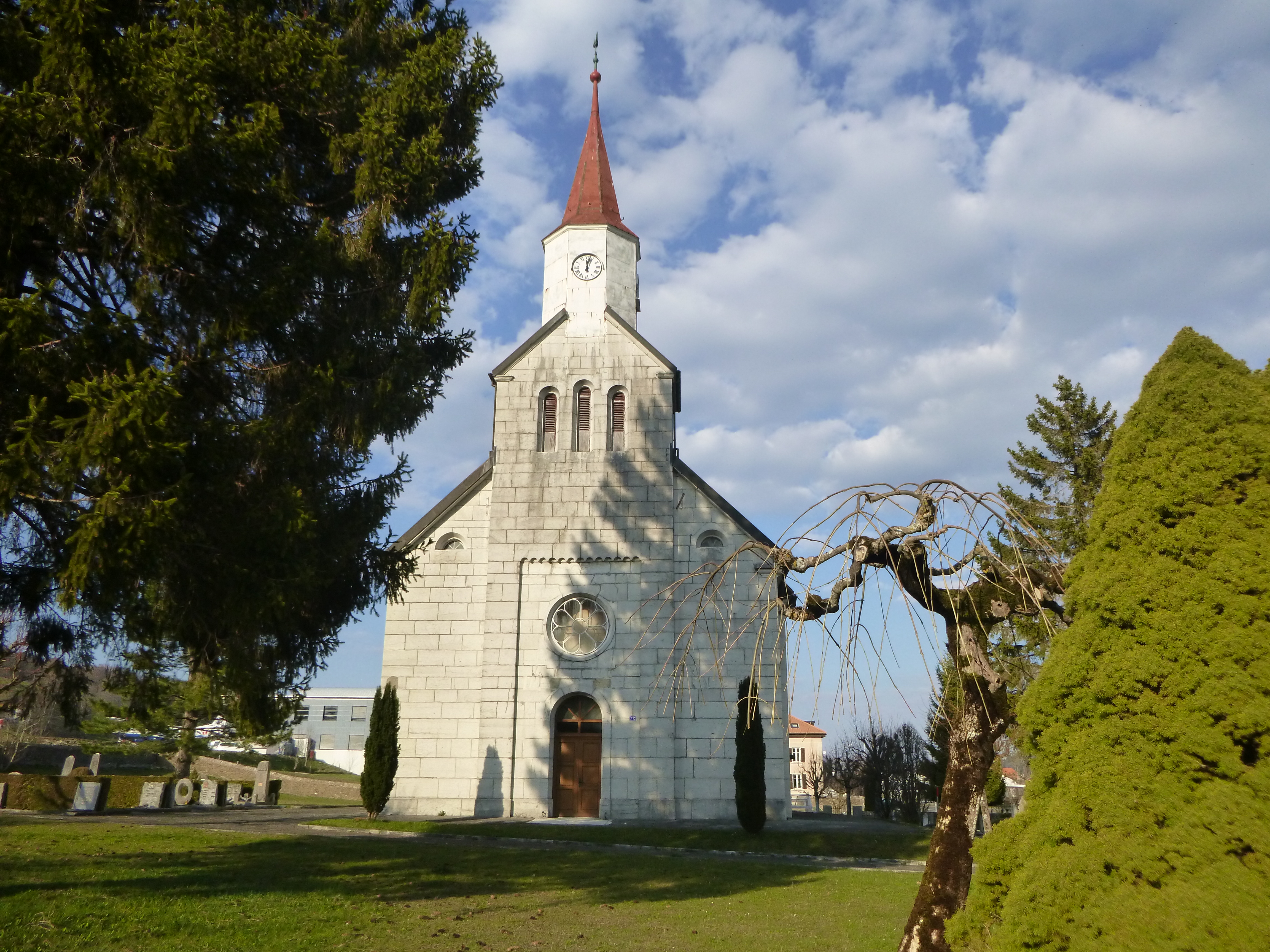 Kirche